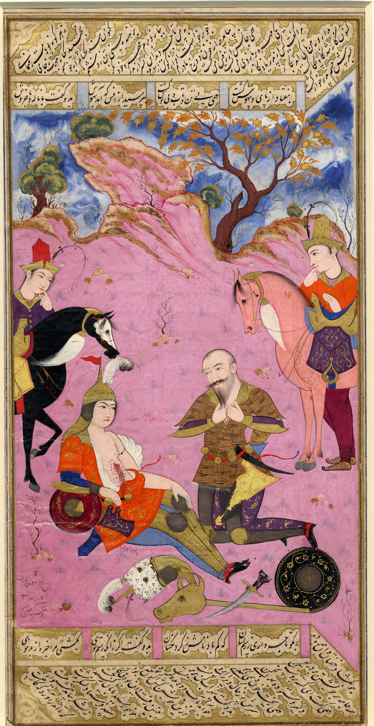 Муин Мусаввир Шахнаме Исфахан 1649